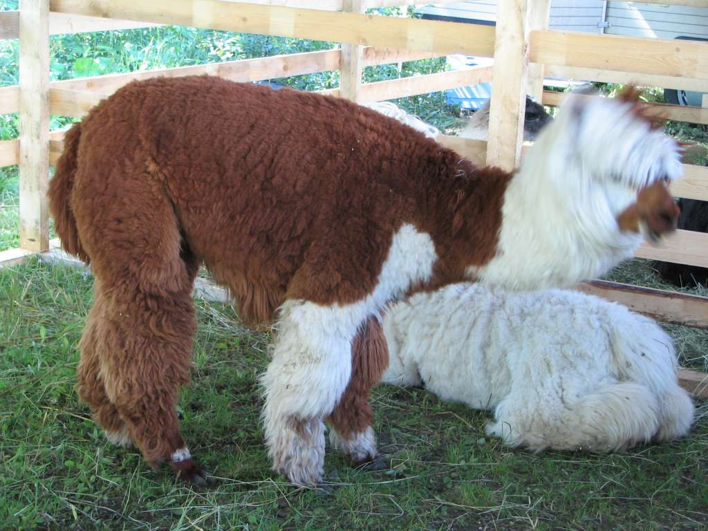 Alpakka :)